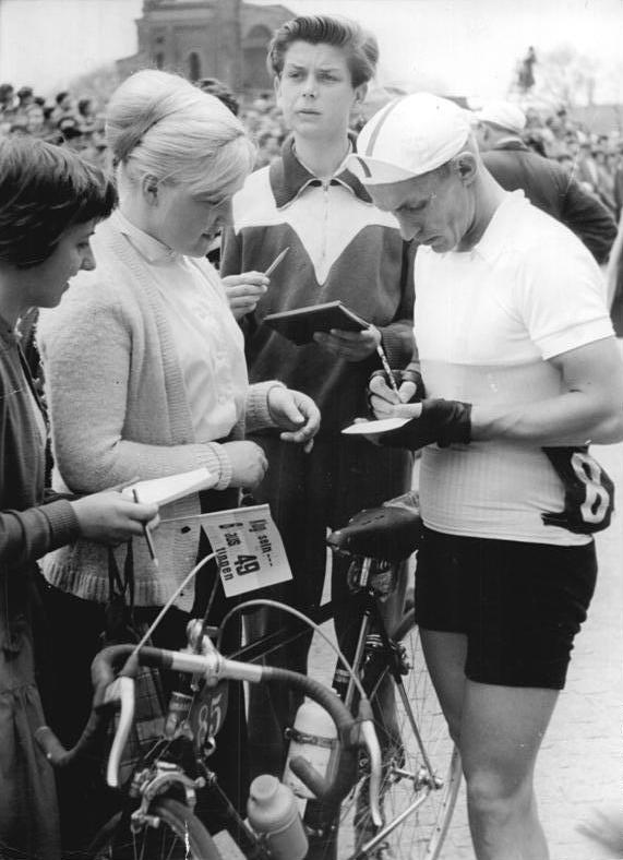 Pawel Wostrajakow Zentralbild Löwe 14.5.1960 - XIII. Friedensfahrt 1960 - 11. Etappe am 14.5.1960 von Dresden nach Leipzig über 201 km, wurde gewonnen von Hagen (DDR). Ihm folgten 3 weitere DDR-Fahrer: Adler, Weissleder und Eckstein. UBz: Der sowjetische Fahrer und Mannschaftskapitän Pawel Wostrajakow gibt in Dresden Autogramme an die sportbegeisterte Jugend.